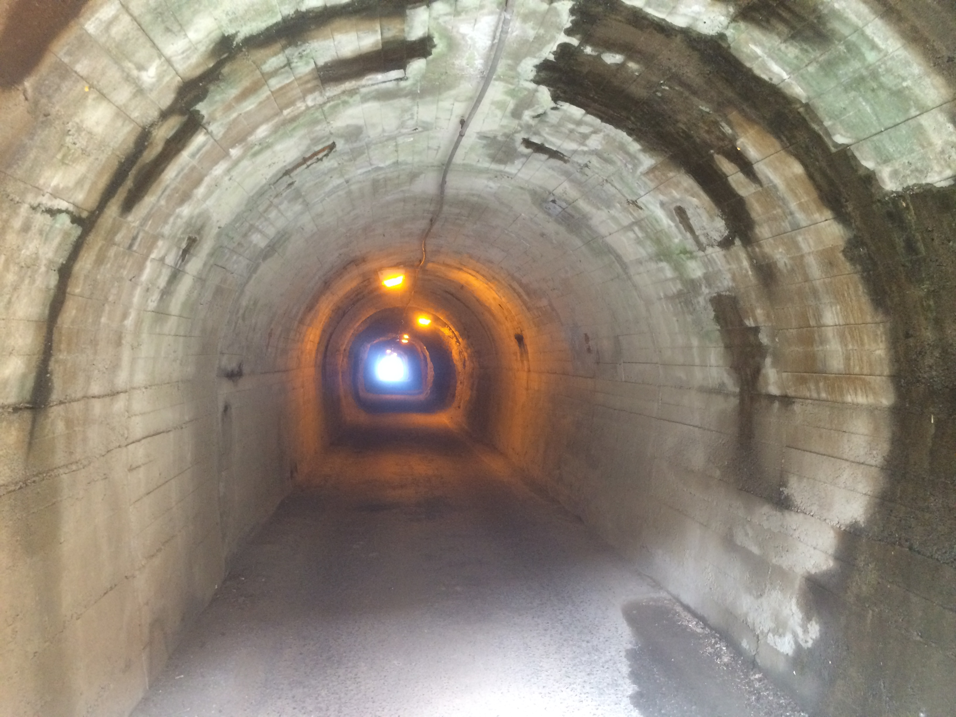 瀬戸内海の高根島にある「内の浦トンネル」。2014年5月撮影。道路拡張のために撮影の翌週に破壊された。途中まではコンクリートで被覆されているが、その後は素掘りになっていた。入口からは反対側の海が臨め、コントラストが美しい場所だった。